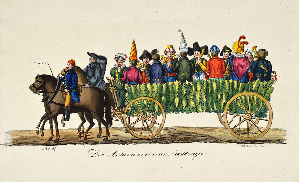 Tafel 27 (Der Aschenmann, und ein Musikwagen), aus: Die Große öffentliche Maskerade zu Pferde und zu Wagen in Bamberg am Fastnachts-Montage 1837. Bamberg, Lachmüller, (1837).